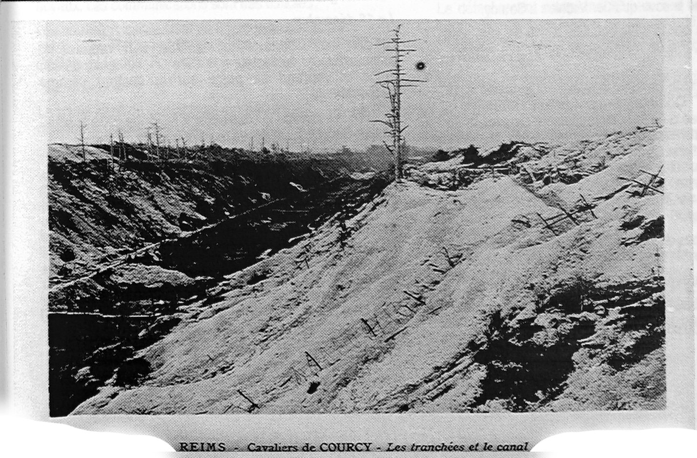 sur une vue du début du XXe siècle.